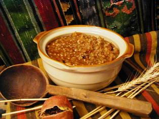 Ամանորի ծիսական ապուր՝ անուշապուր